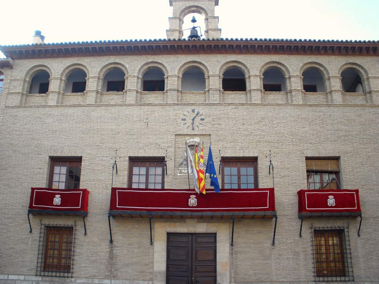 Ayuntamiento de Borja (Zaragoza)